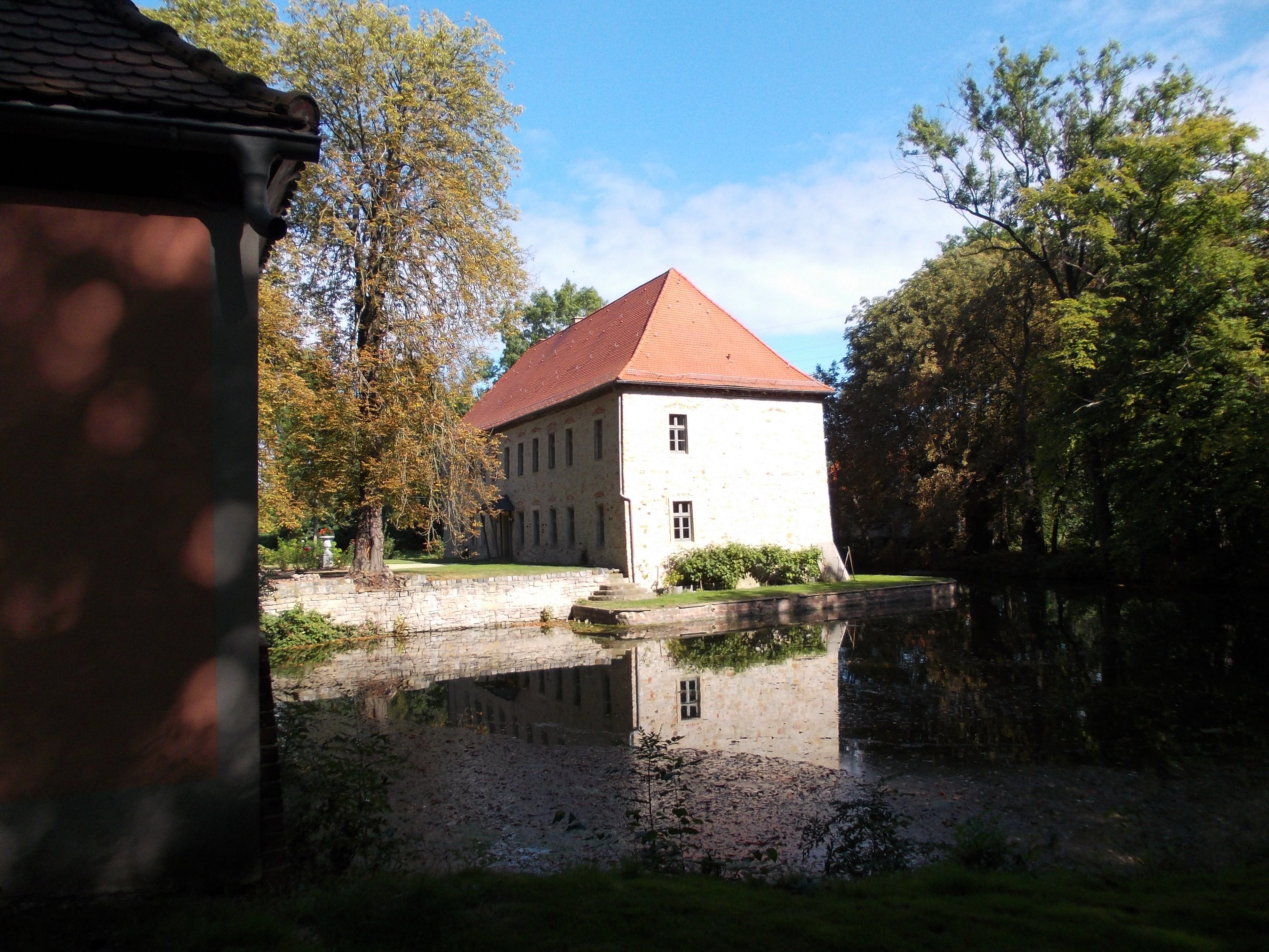 Wasserschloß Bonau (Stadt Teuchern)